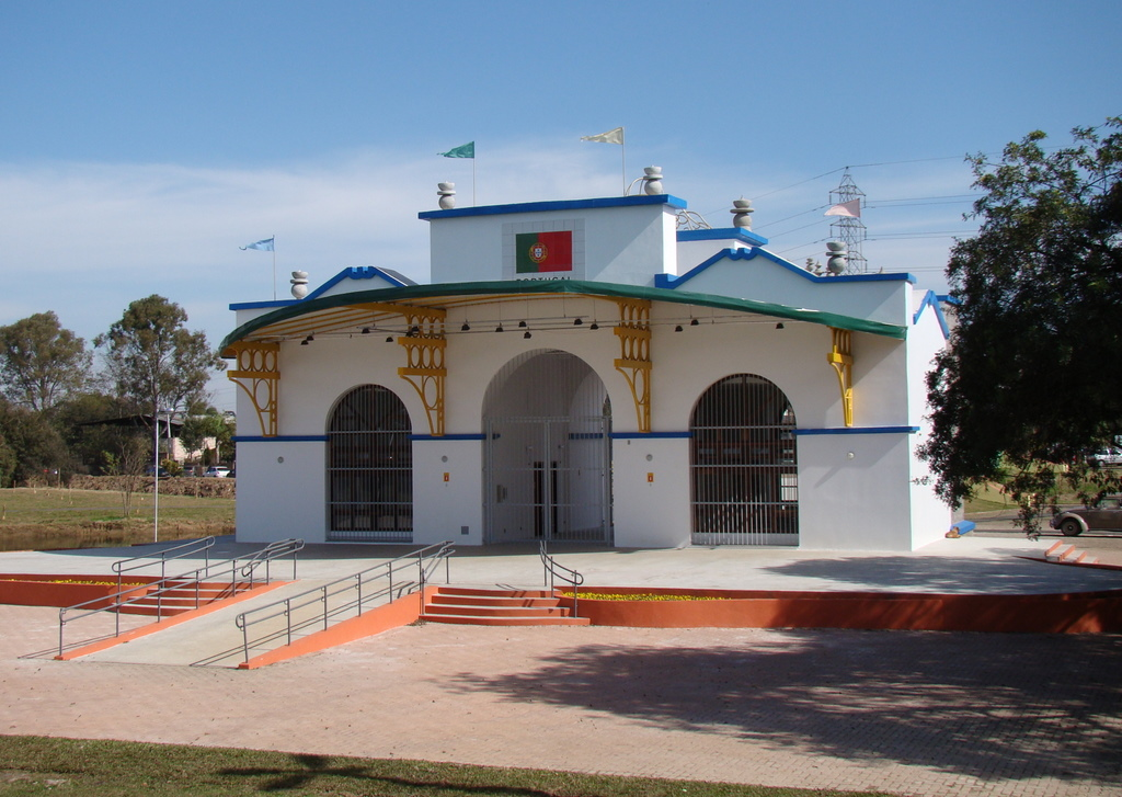 Centro Cultural Vilinha, em Curitiba (capital do estado do Paraná, Sul do Brasil), localizado às margens do Rio Atuba (no Bairro Alto) dentro do Parque Histórico de Curitiba/Parque Histórico da Vilinha.